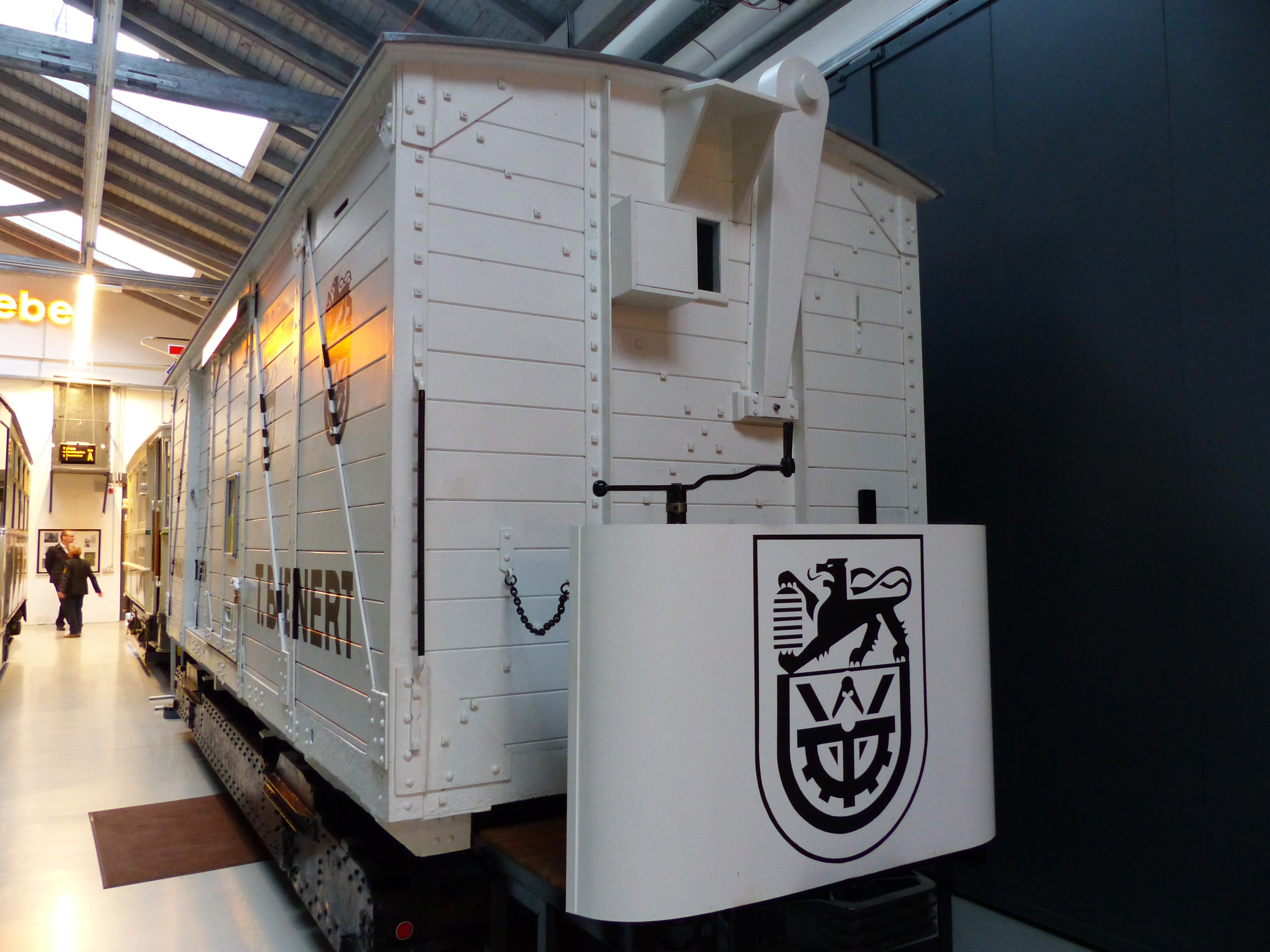 Straßenbahnmuseum Dresden, Trachenberger Str. 38, 01129 Dresden